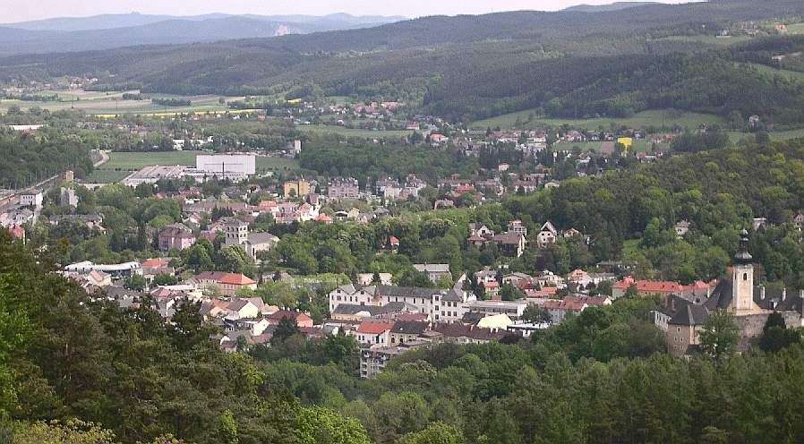 Blick vom Eichberg